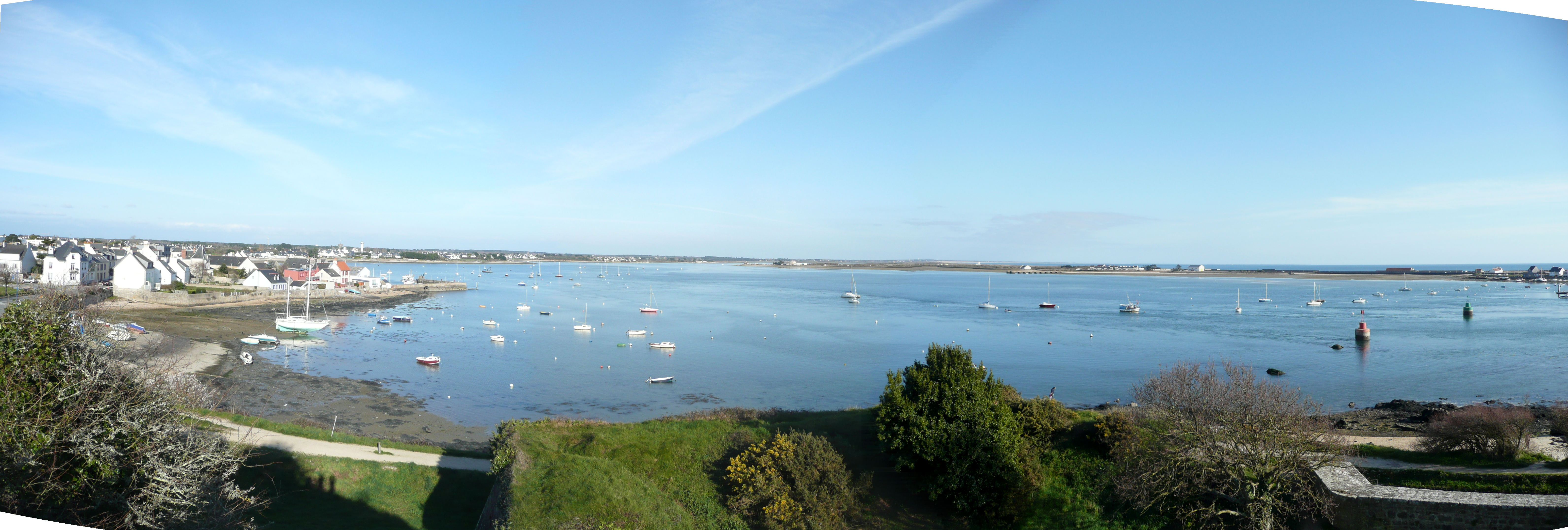 vue panoramique de la petite mer de gâvres vue de la table d'orientation de Port-Louis